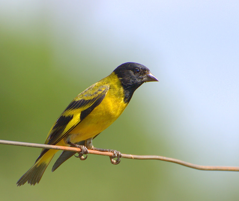 Agradecimento especial a Elias Sahade Junior e Percio da EPR - VIVEIRO DE MUDAS NATIVAS - Fazenda Vô-Vó - Piraju-SP, que gentilmente viabilizaram o acesso à propriedade. .br/index.php.htm